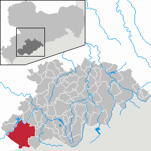 Eibenstock im Erzgebirgskreis, Sachsen